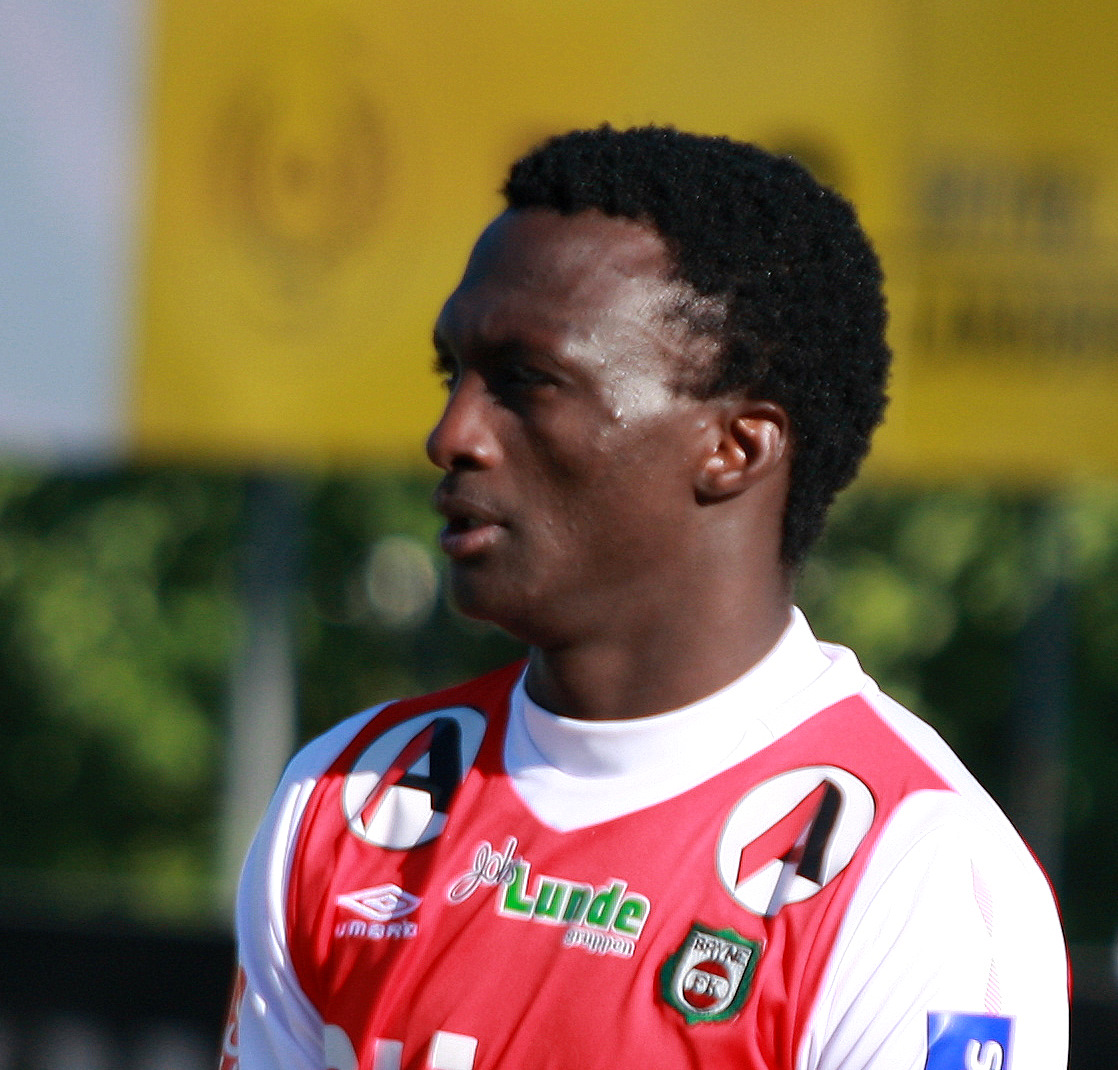 Ezekiel Bala at Bryne stadion